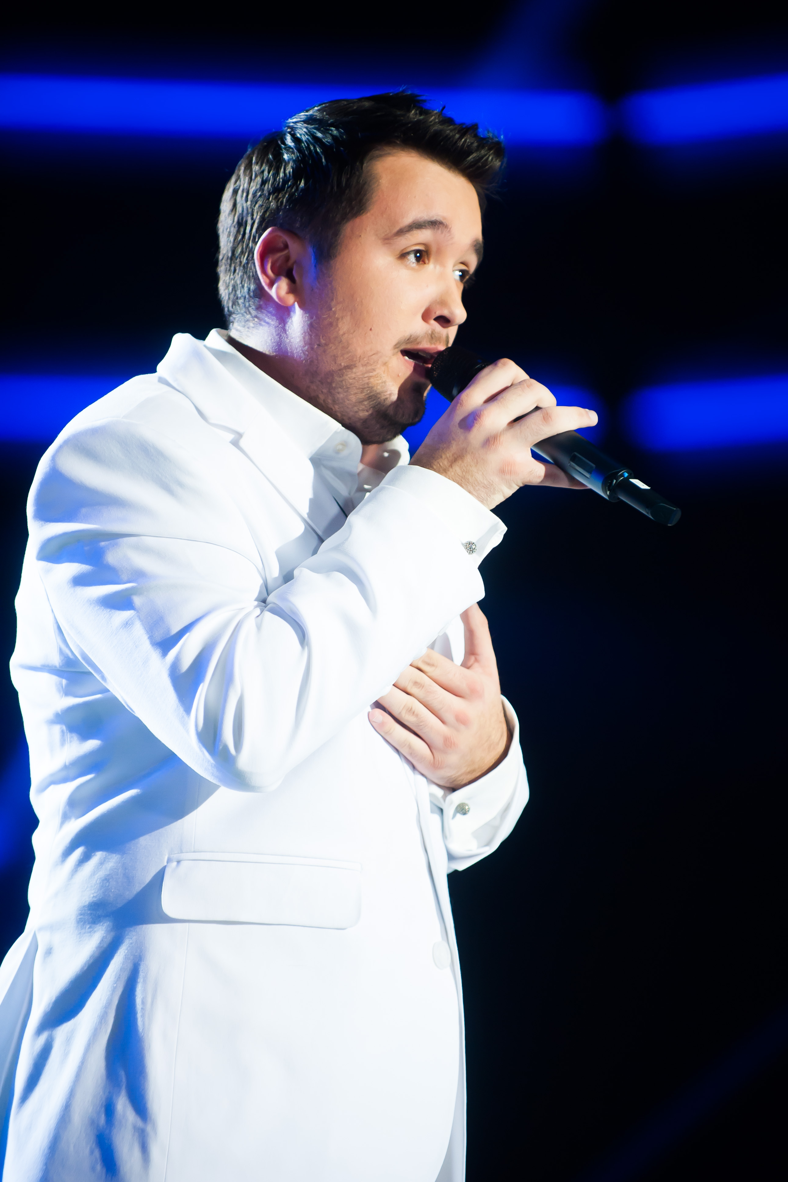 A The Voice Magyarország Hangja középdöntőjében - Fotó: Schumy Csaba